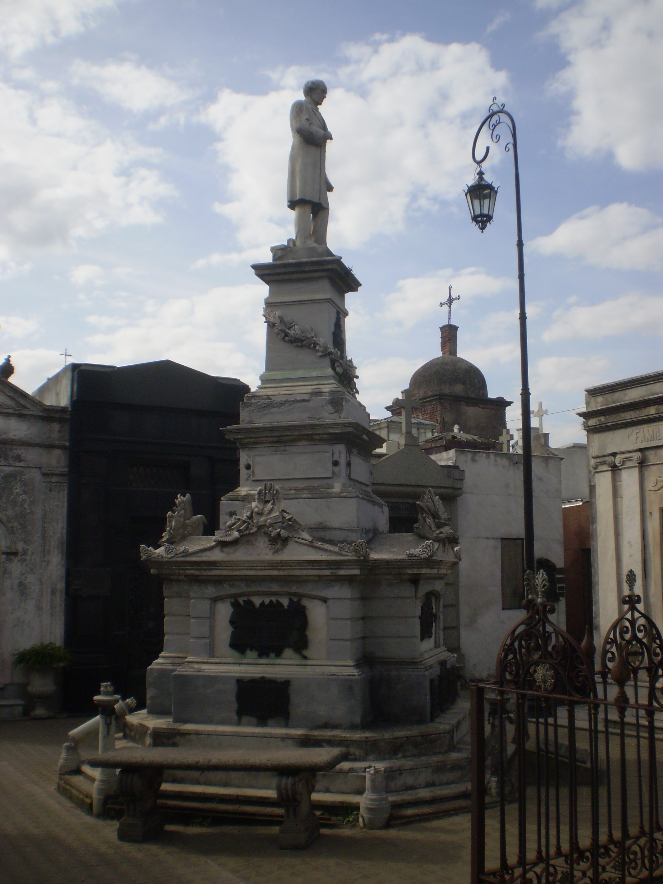 Monumento fúnebre de Juan Bautista Alberdi, Cementerio de la Recoleta, Buenos Aires.